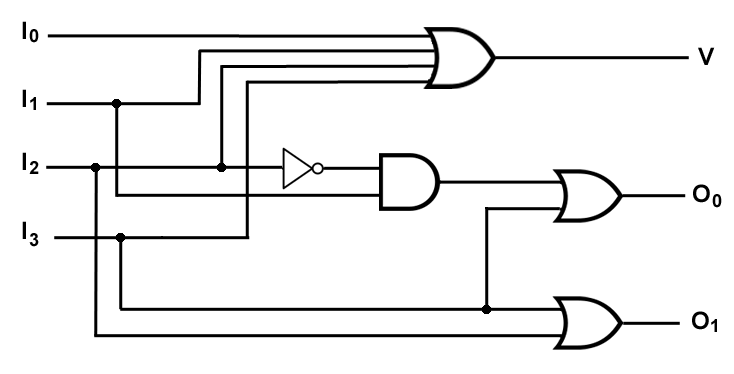 우선순위 디코더 2x4